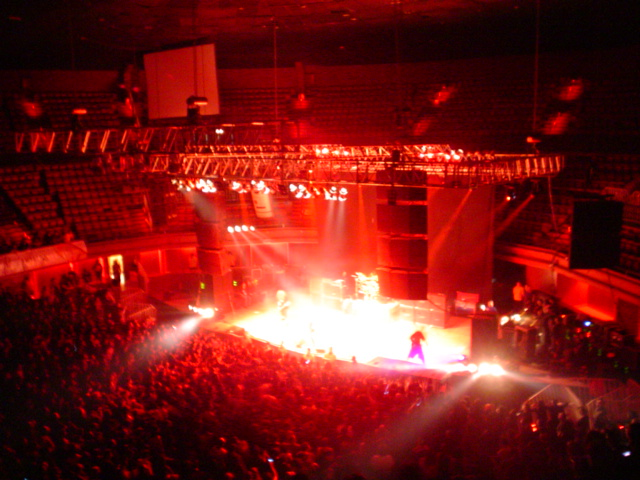 Live in Chile 2006